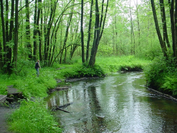 Die Este bei Kakenstorf. Fotograf: Reinhard Kraasch Fotografiert am: Juni 2004